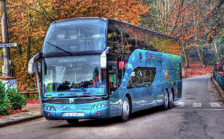 oooooo